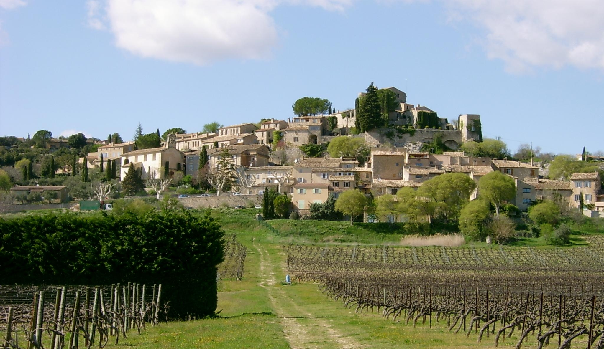 Blick auf das Dorf Jucas